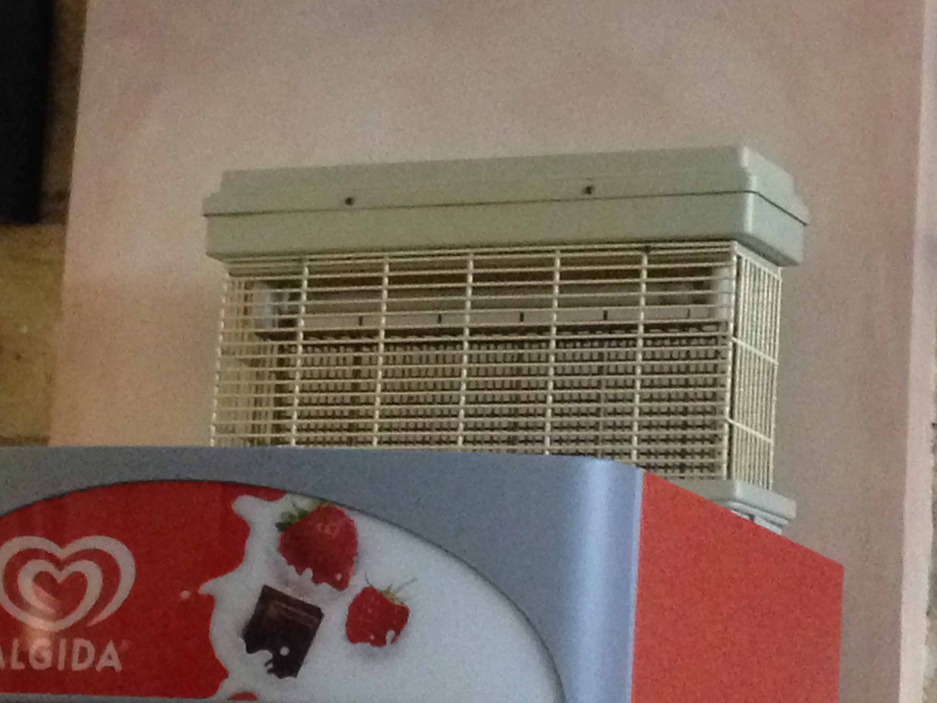 Zanzariera elettrica con lampada